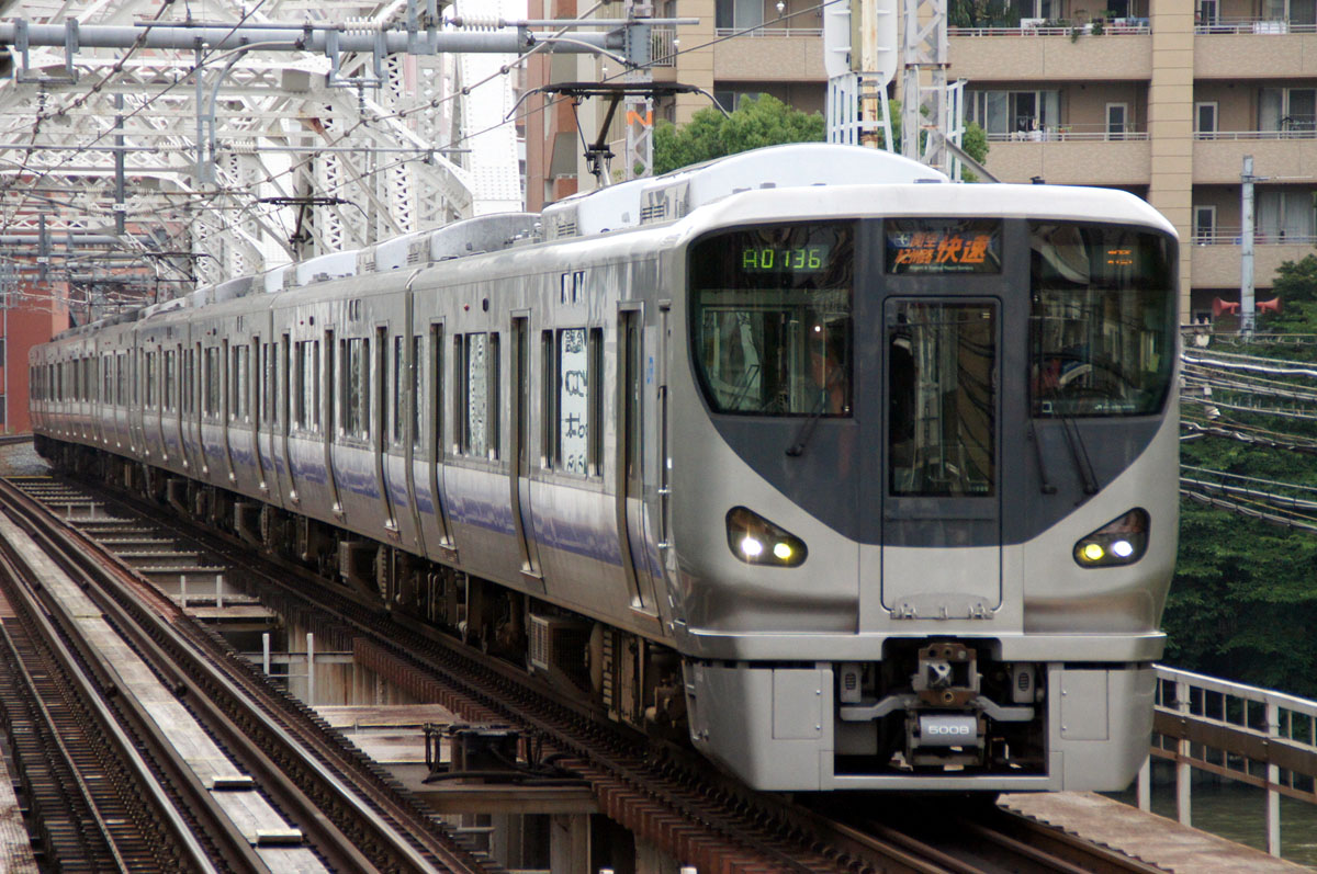 JR西日本225系（大阪環状線）